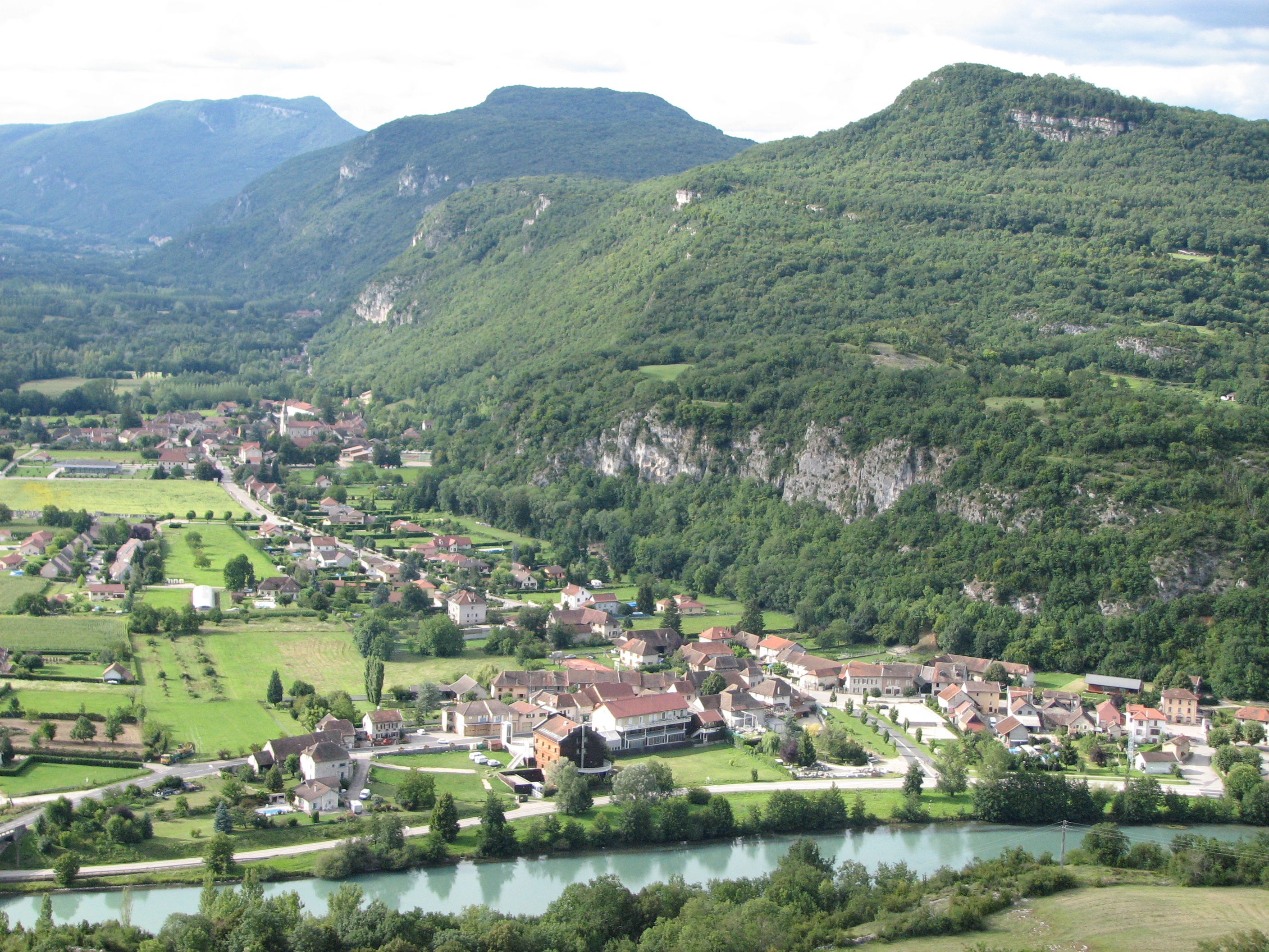 Vue de Brégnier-Cordon (Ain), avec le hameau de La Bruyère au premier plan, celui de Brégnier autour de l'église. En bas de l'image, le canal de dérivation de Brégnier-Cordon. Photo prise du sommet du mont de Cordon.